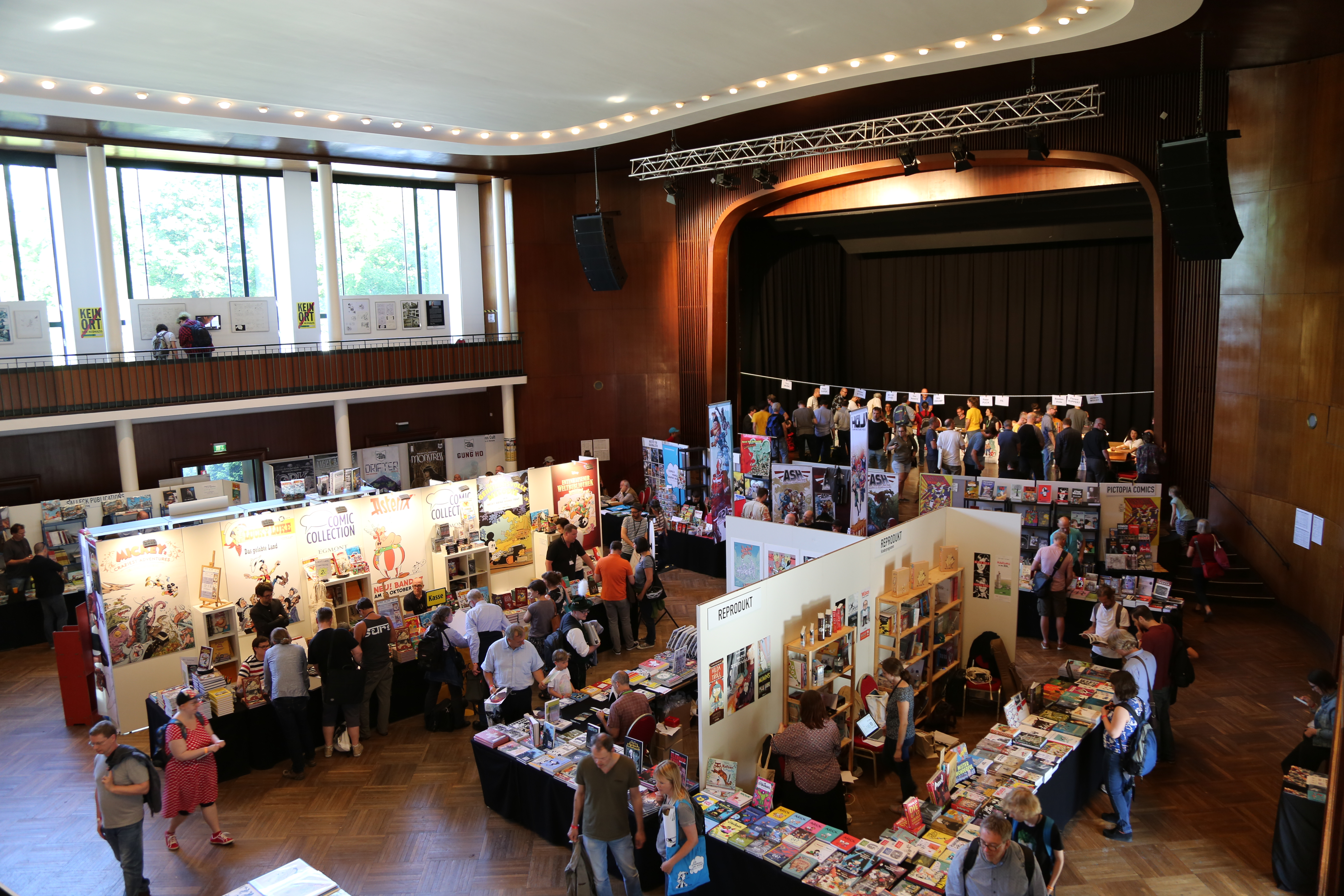 Stände auf dem Comicfestival 2017 in der Alten Kongresshalle in München.